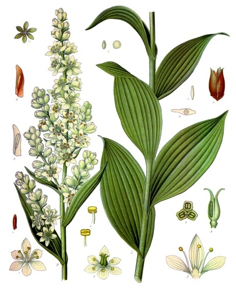 Weißer Germer. A B Theile der Pflanze in natürl. Grösse; 1 männliche und 2 weibliche Blüthe, vergrössert; 3 männliche Blüthe zerschnitten, desgl.; 4 Staubgefässe geschlossen und geöffnet, desgl.; 5 Pollen, desgl.; 6 Stempel im Längsschnitt, desgl.; 7 derselbe im Querschnitt, desgl.; 8 Frucht, natürl. Grösse; 9, 10 Same, natürl. Grösse und vergrössert; 11 derselbe im Längsschnitt, vergrössert; 12 derselbe im Querschnitt, desgl.; 13 Embryo, desgl.